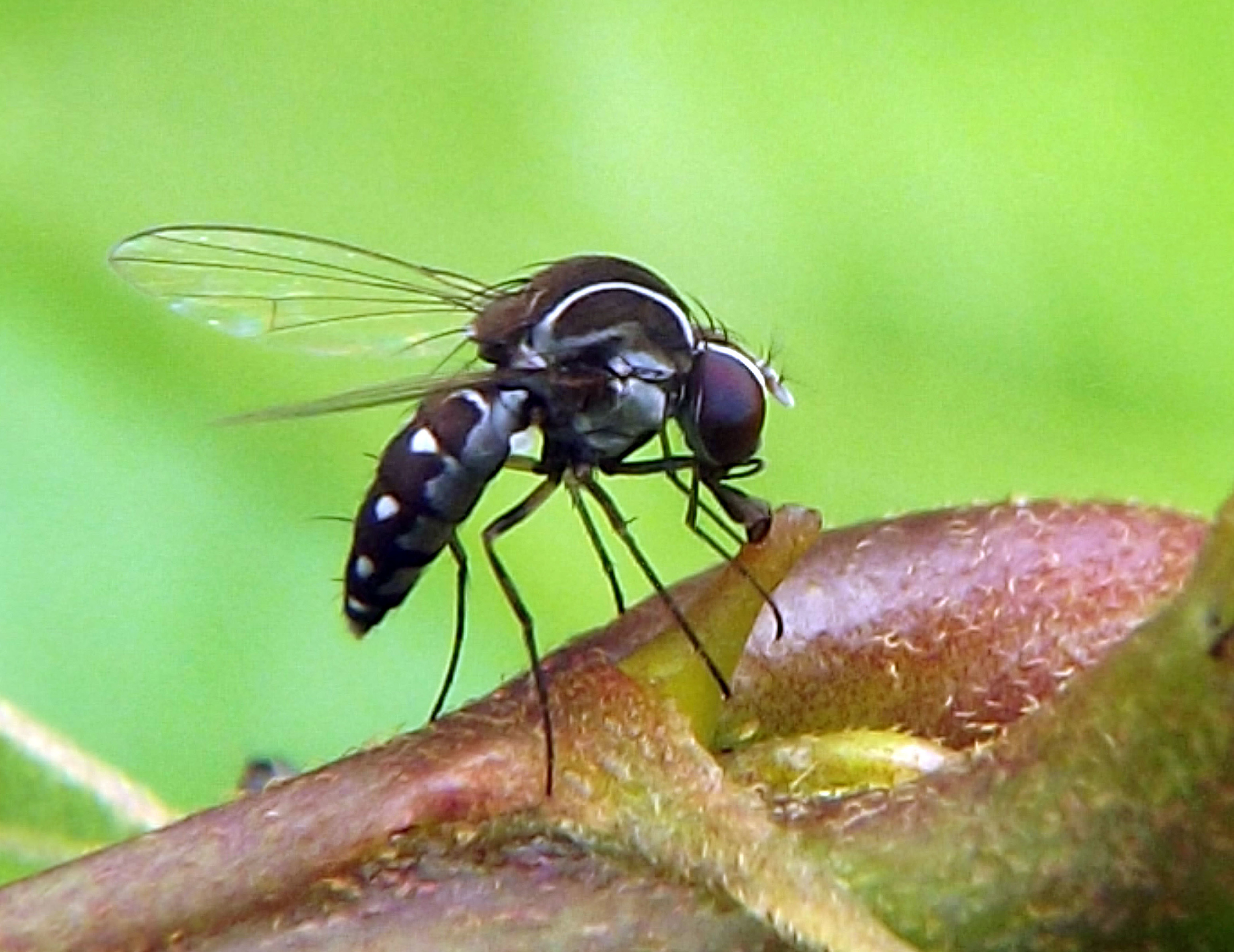 Curtonotidae